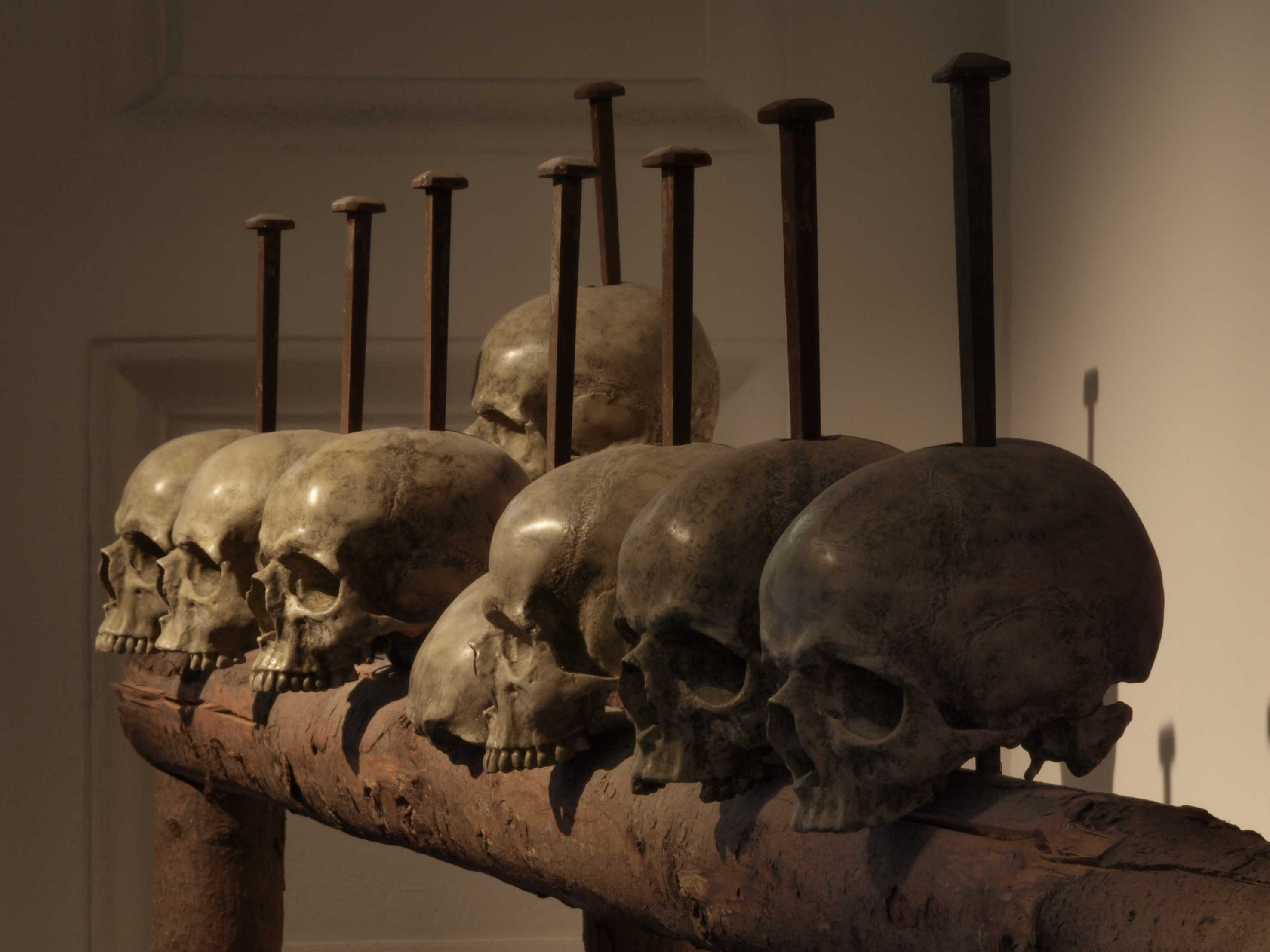 Zur Abschreckung auf einem Balken genagelte Schädel enthaupteter Piraten. Modell im Museum für Hamburgische Geschichte nach historischen Abbildungen, textlichen Erwähnungen und archäologischen Funden aus dem 15./16. Jahrhundert.